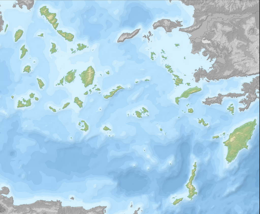 Mappa di localizzazione delle antiche regioni greche. Egeo meridionale.